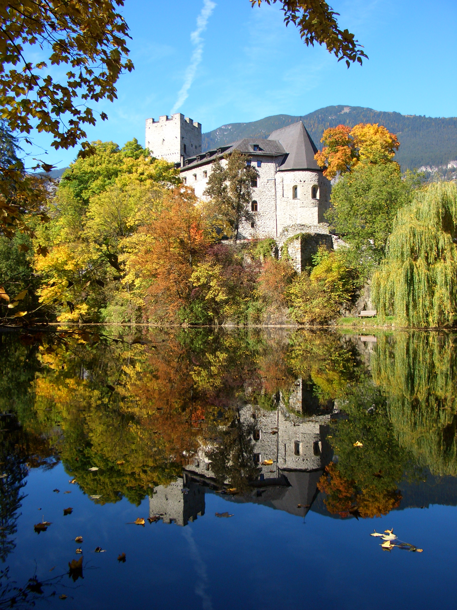 Burg Petersberg im Oktober 2011. Foto: A. d´Orfey, Kunst im Licht, München 2006